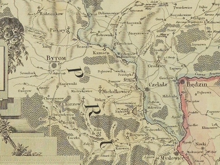 "Mappa szczegulna woiewodztwa Krakowskiego i Xięstwa Siewierskiego zrządzona z innych wielu mapp mieyscowych tak dawniey iak i swiezo odrysowanych tudziez goscincowych i niewątpliwych wiadomości" Kolekcja Niewodniczański, depozyt w Zamku Królewskim w Warszawie